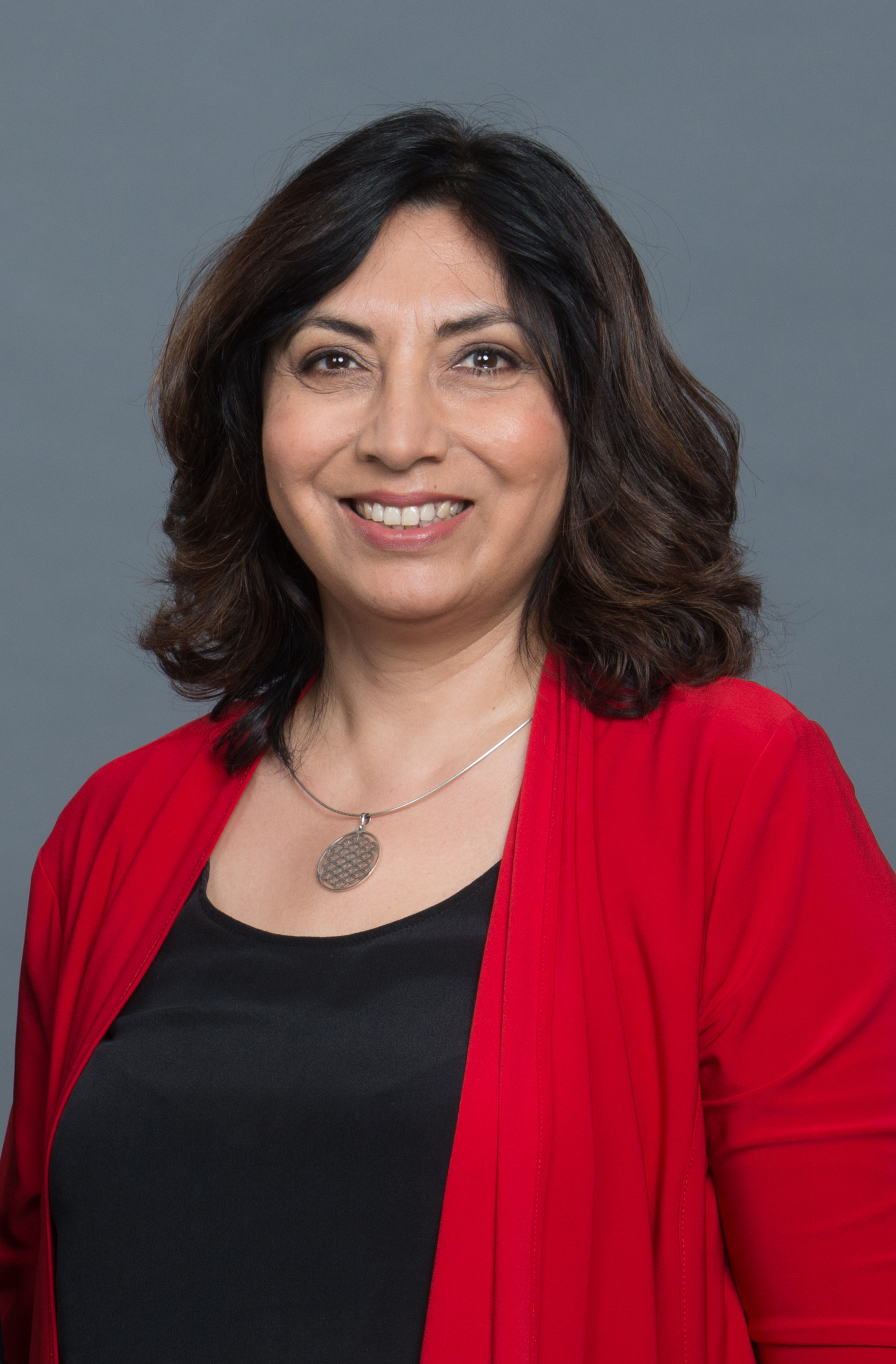 Selma Yildirim NRWahl-8945